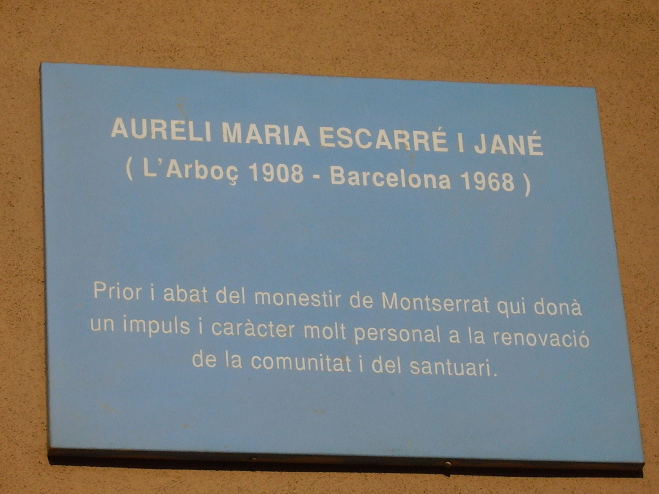 Placa a la Plaça Abat Escarré a Sant Andreu,Barcelona,Catalunya.